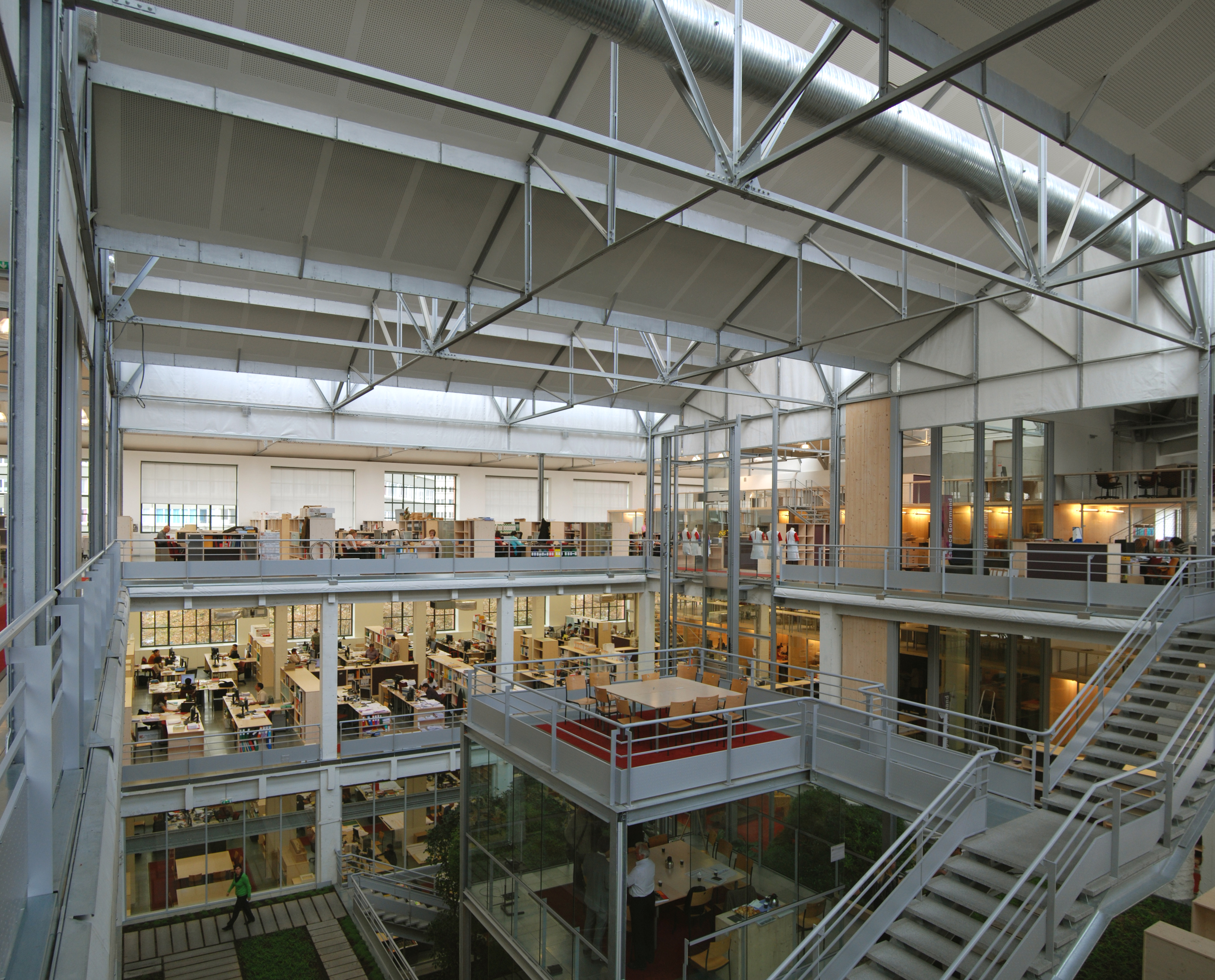 Photographie du siège de Gares et Connexions